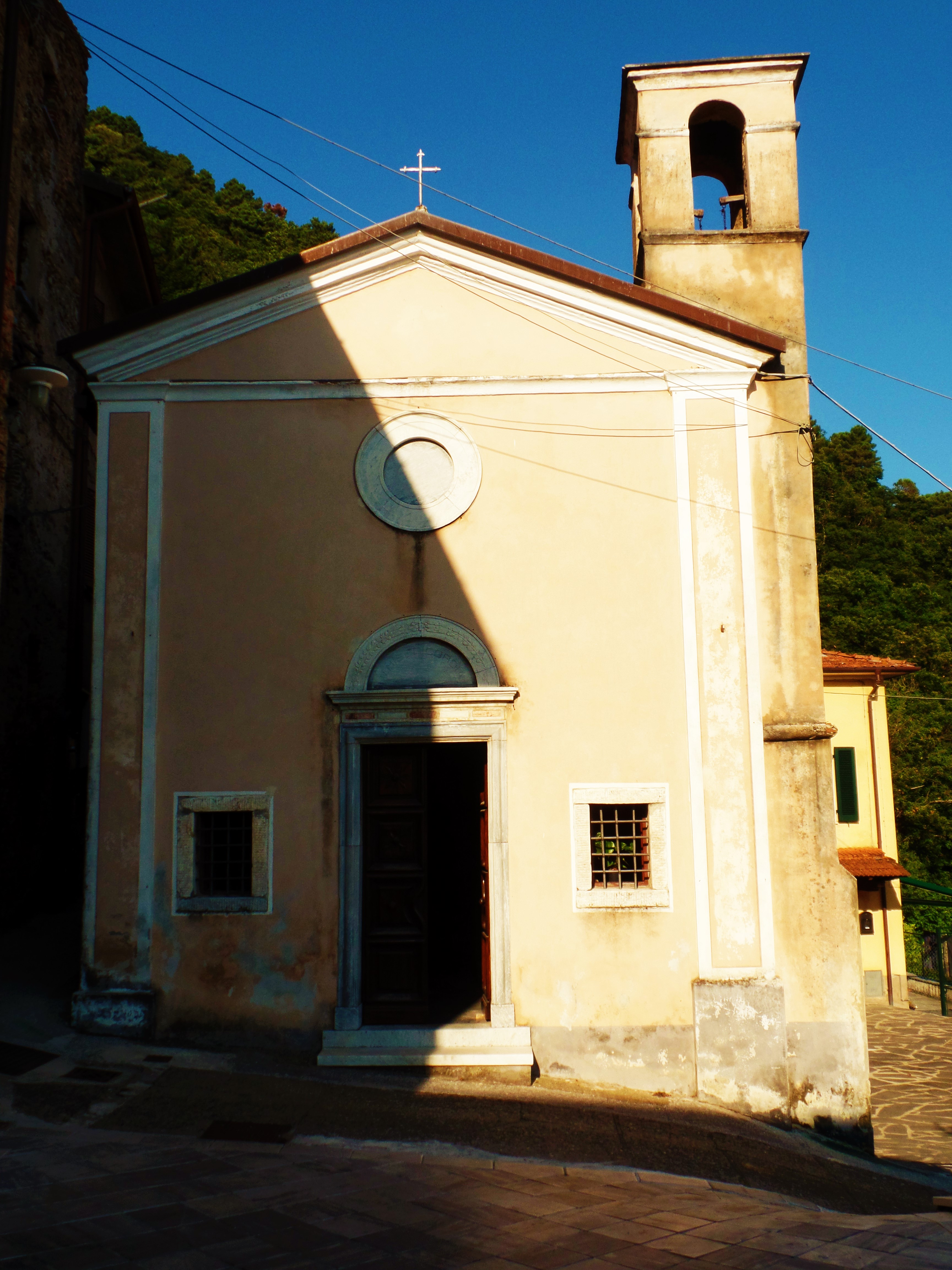 La chiesa più piccola di Retignano, Stazzema, Italia, così come appariva nel 2015